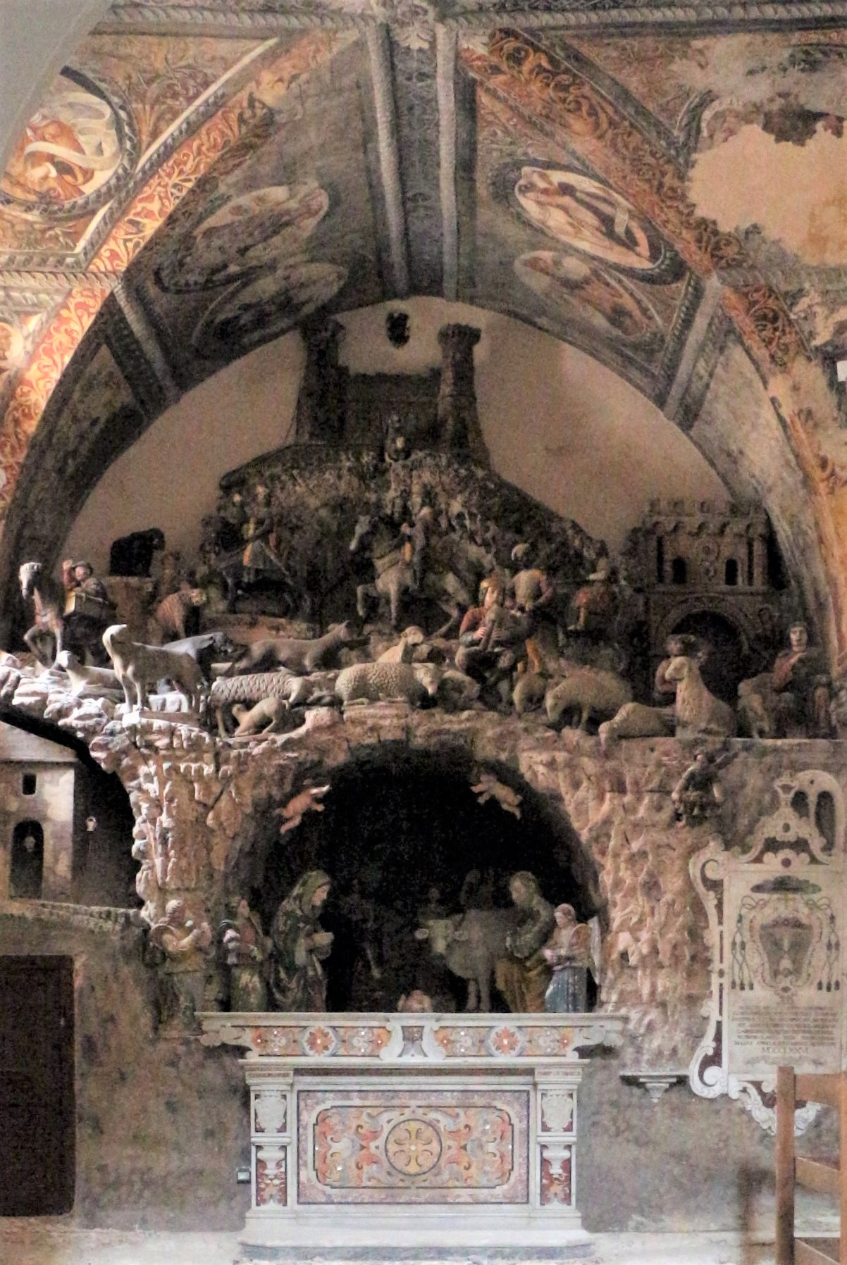 Presepe in pietra realizzato nel 1530 da Altobello Persio nella Cattedrale di Matera.